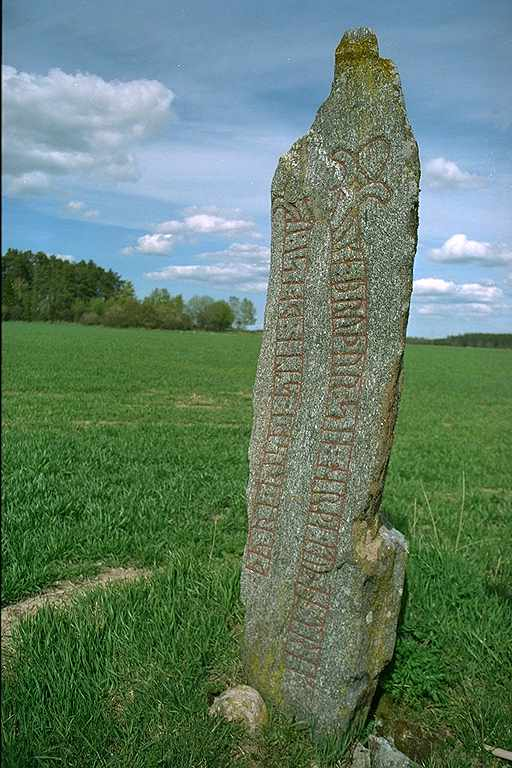 Inskriften lyder: Tore resta denna sten efter Toke, sin broder, en mycket god ung man. Motiv: Vg114 Bjärby Töfta Börjesgård Nyckelord: Runor Kategori: Runristning/runsten Inskriften lyder: Tore resta denna sten efter Toke, sin broder, en mycket god ung man.